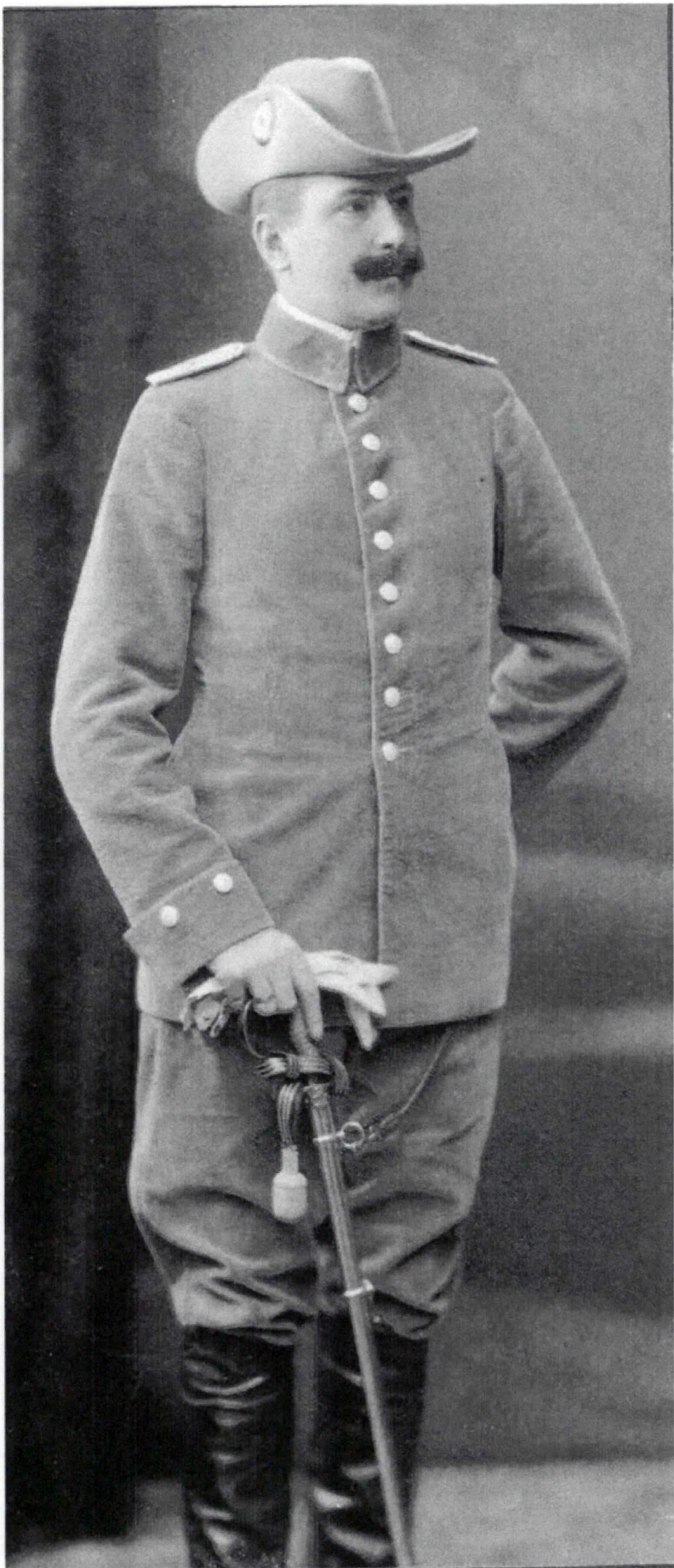 Berend VIII Roosen 1906 als Soldat der Schutztruppen in Südwestafrika